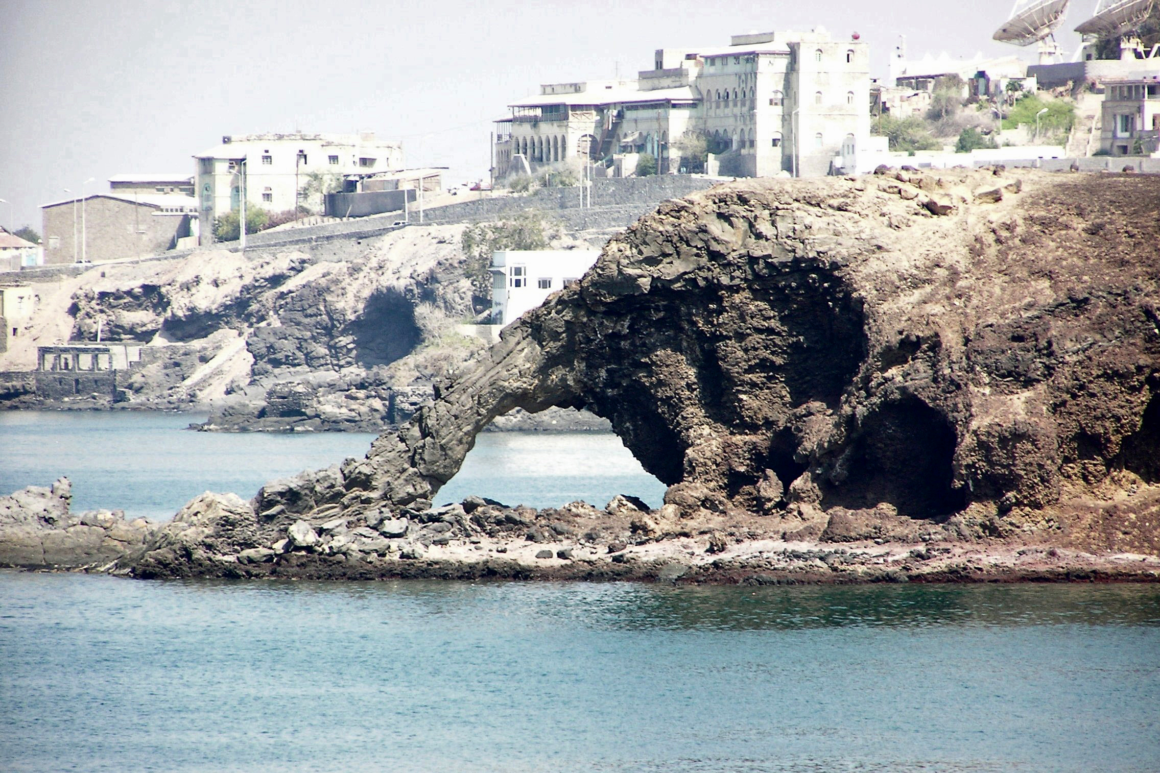 Elephant-rock dans la baie de Gold Mohur à Aden (Yémen)